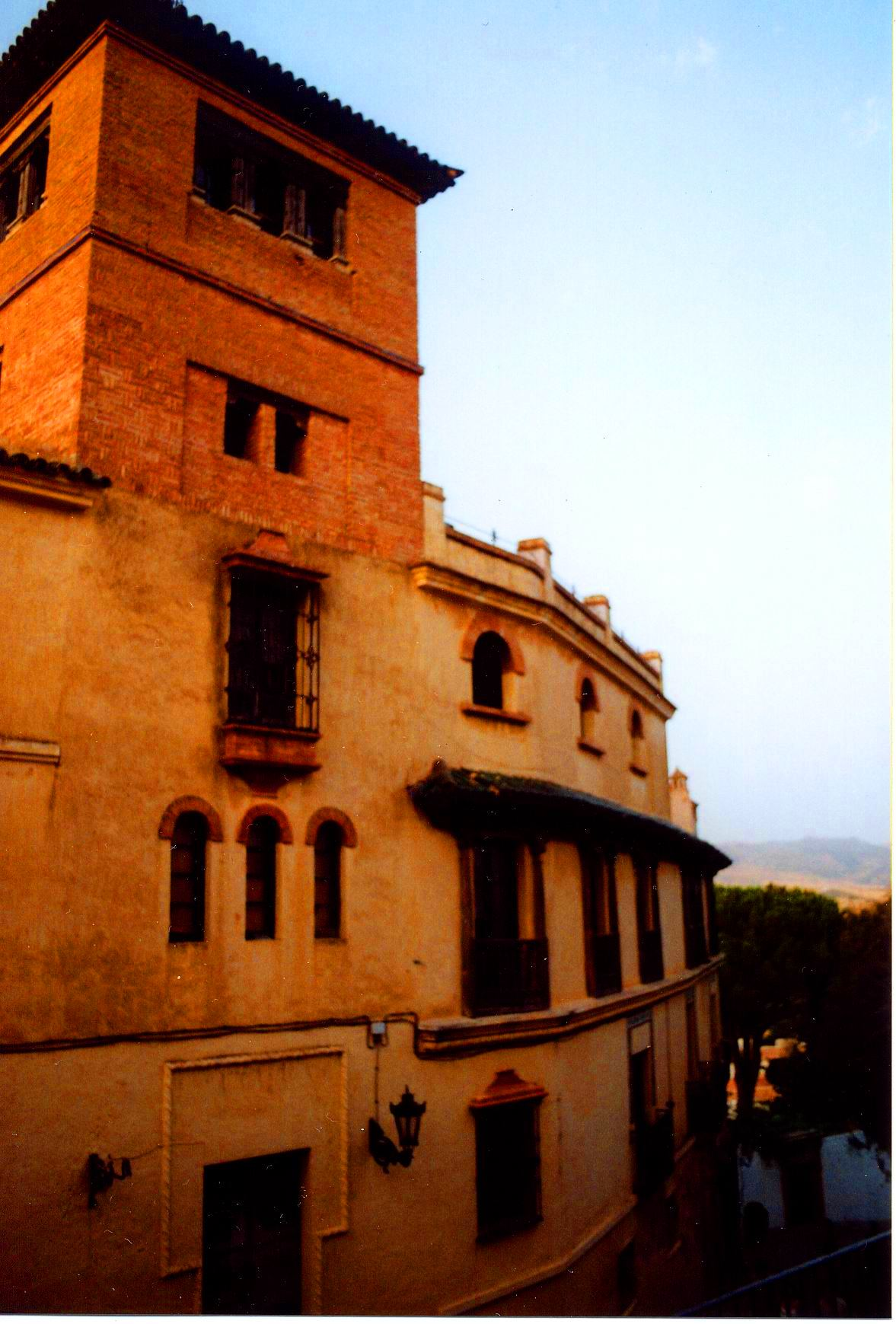 Jardín Anejo al Palacio del Rey Moro